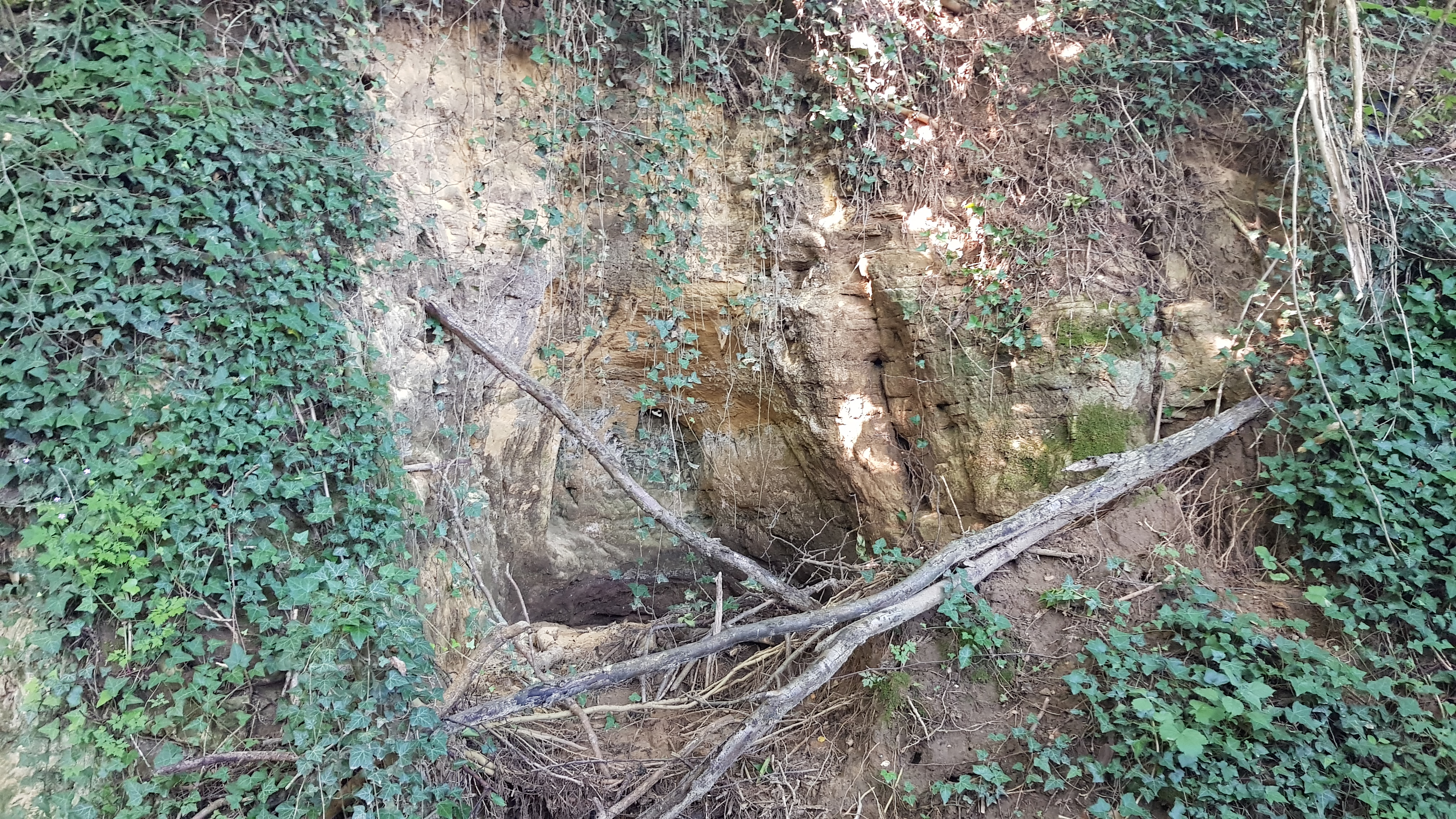 Scheuldergroeve III, Scheulder, Nederland